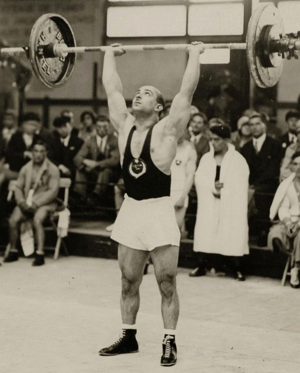 Sport. Sport, Olympische Spelen 1928, Amsterdam : De Turkse gewichtheffer Djemal Bey in actie tijdens het gewichtheffen